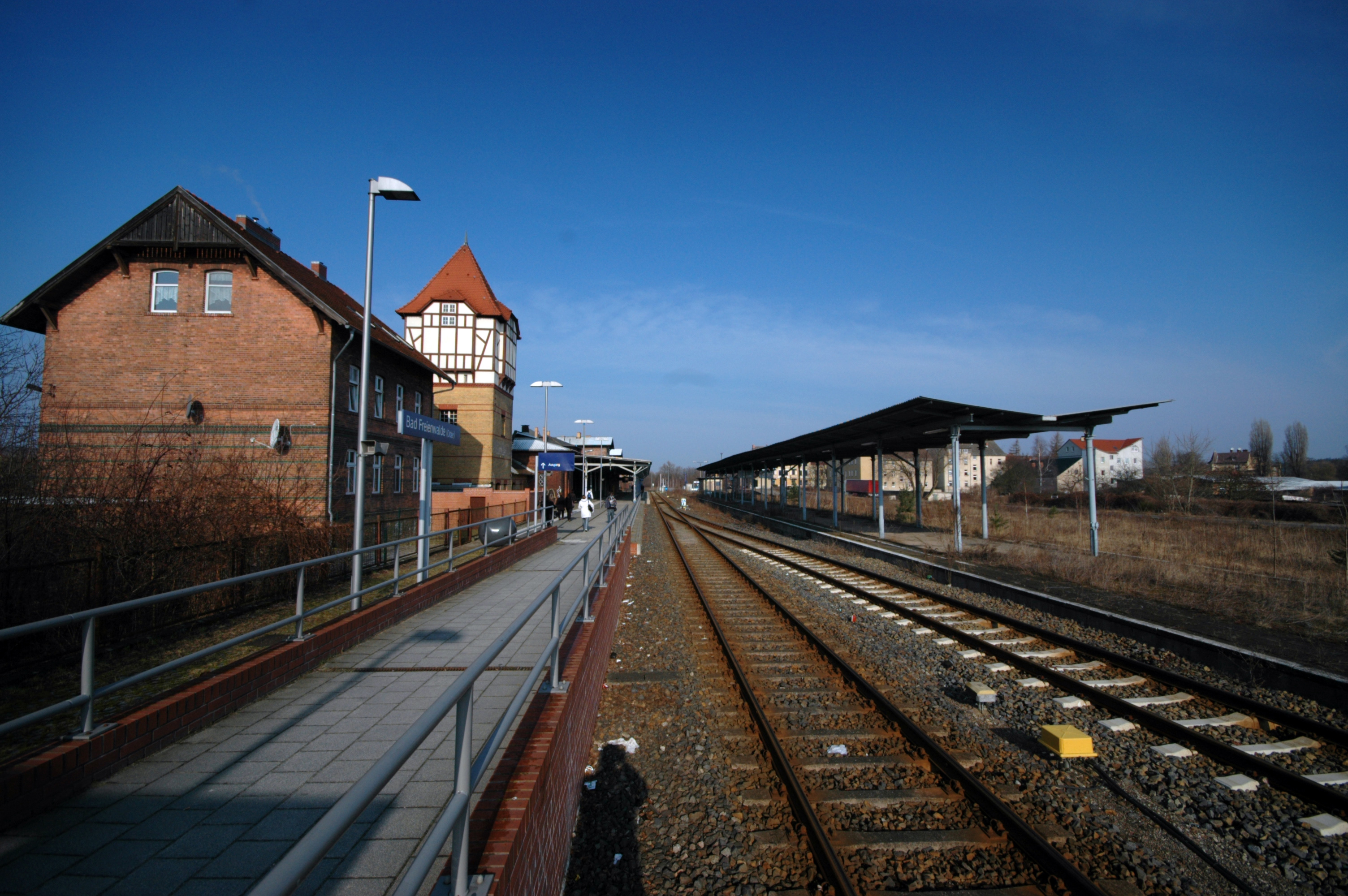 Bad Freienwalde